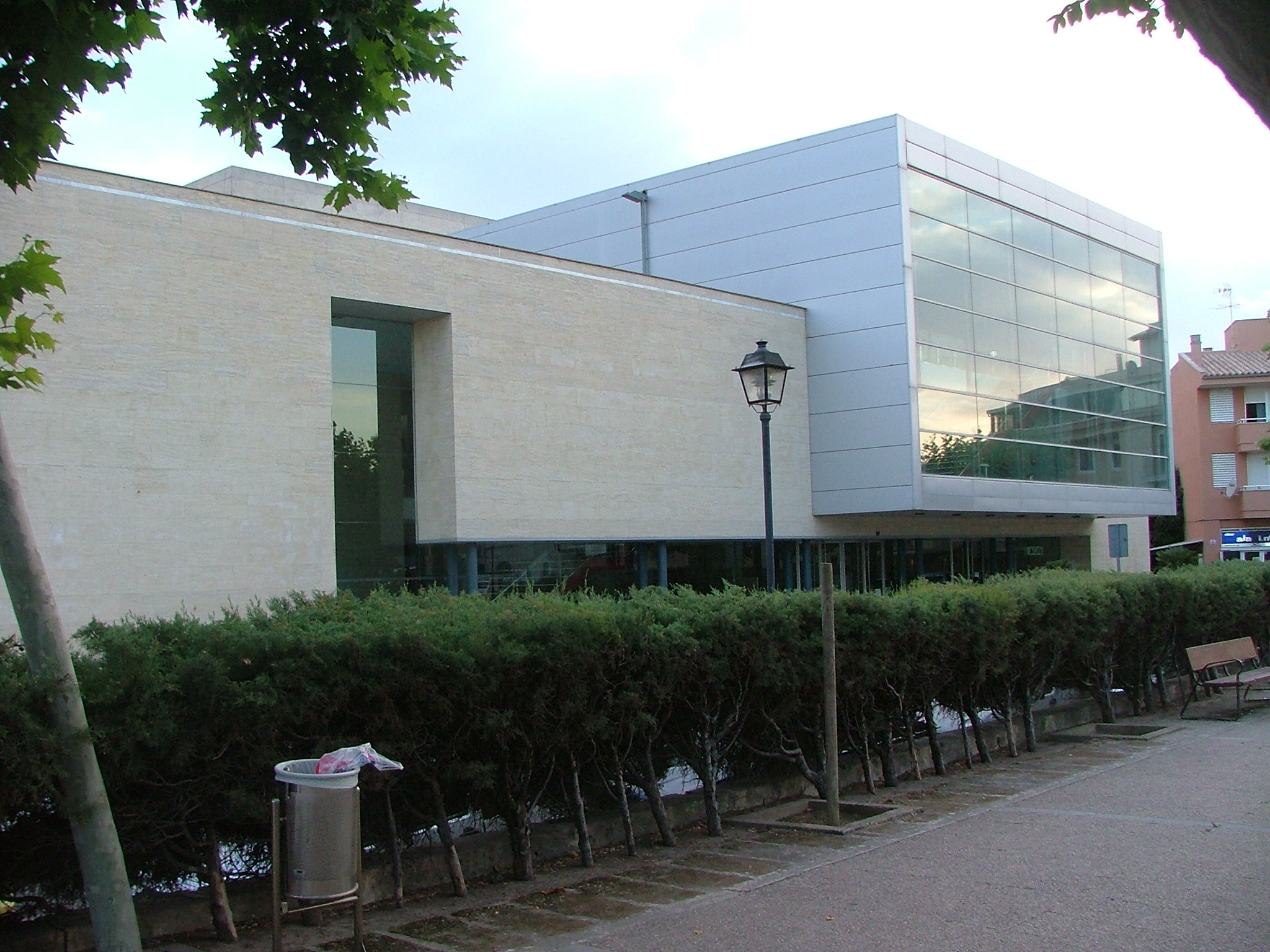 Auditorio of Alcudia, Mallorca, Spain